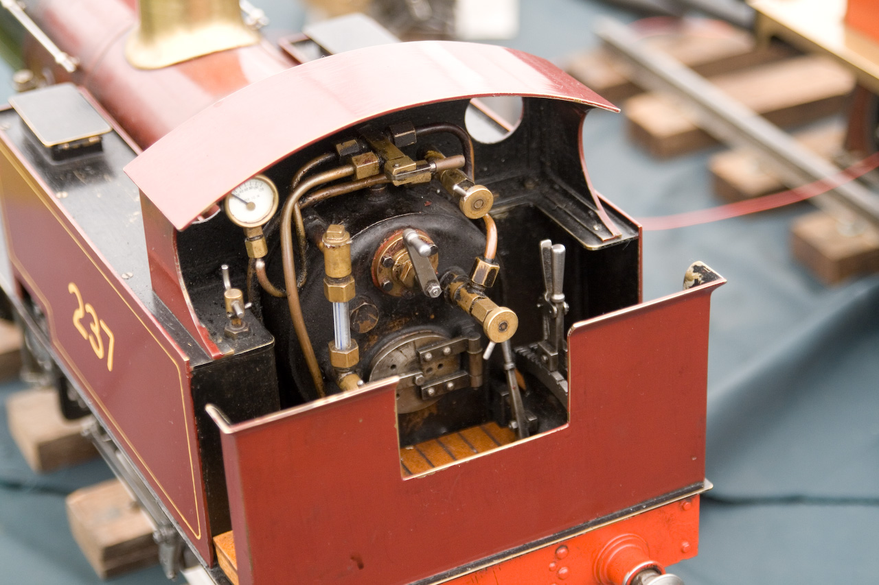 Model train